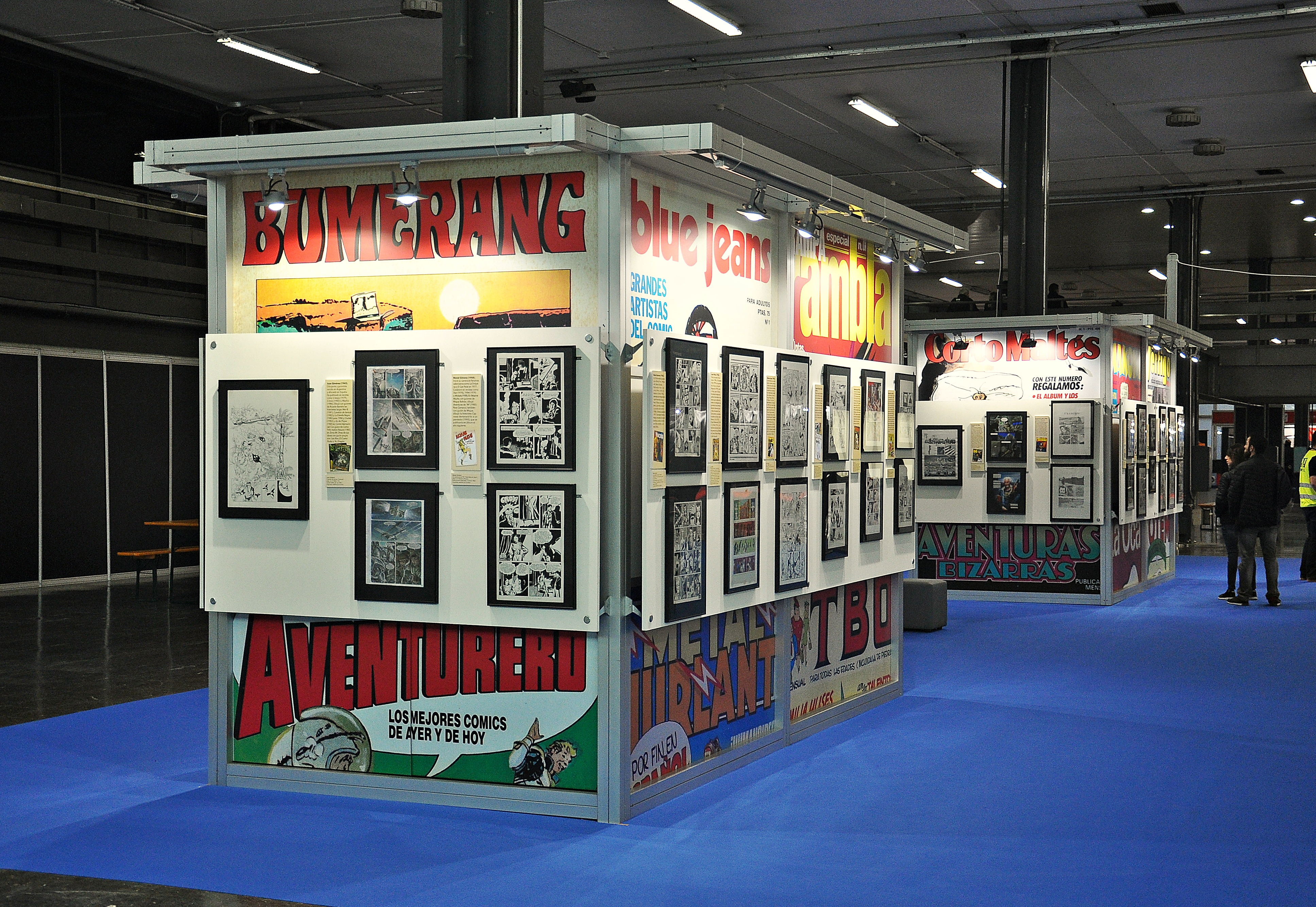 Las revistas del Boom del Cómic